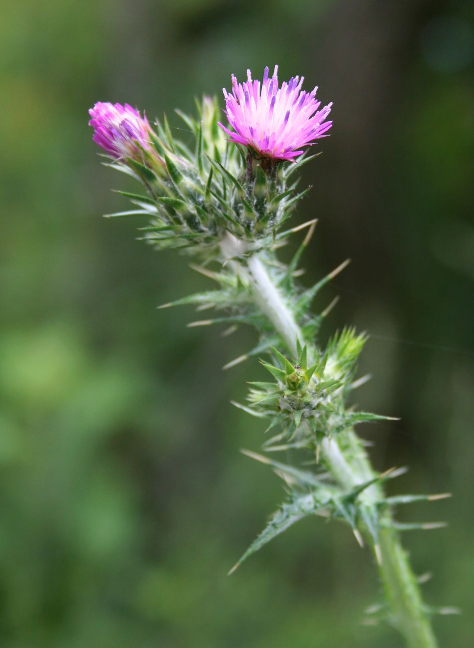 Carduus pycnocephalus, Korbblütler (Asteraceae) - Italien/Italia/Italy: Friuli-Venezia Giulia, Prov. Trieste, Sistiana, Rilkeweg/Sentiero Rilke